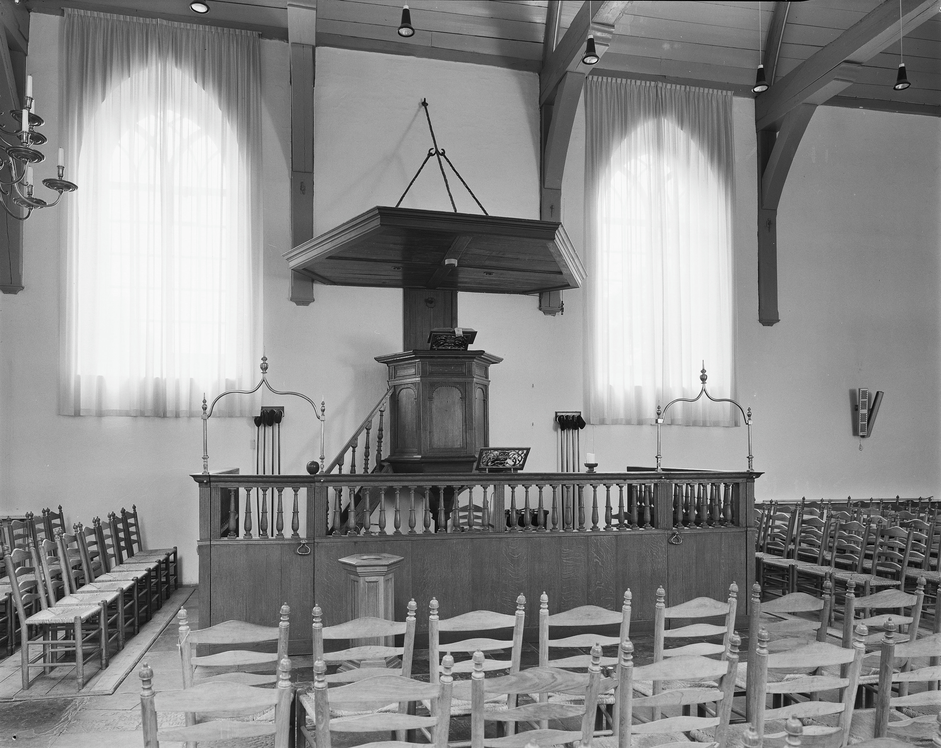 Nederlands Hervormde Kerk: INTERIEUR, PREEKSTOEL MET DOOPTUIN